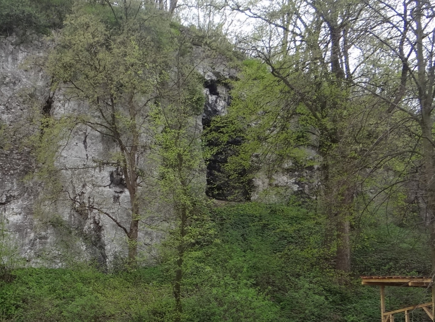 Skała Skurwysyn na Wzgórzach Tynieckich w Krakowie